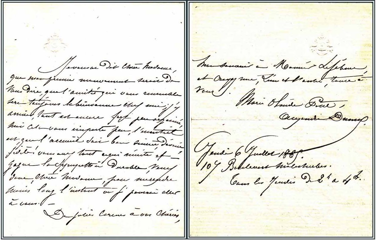 Письмо Мари Алекснадрин Дюма 6 июля 1865